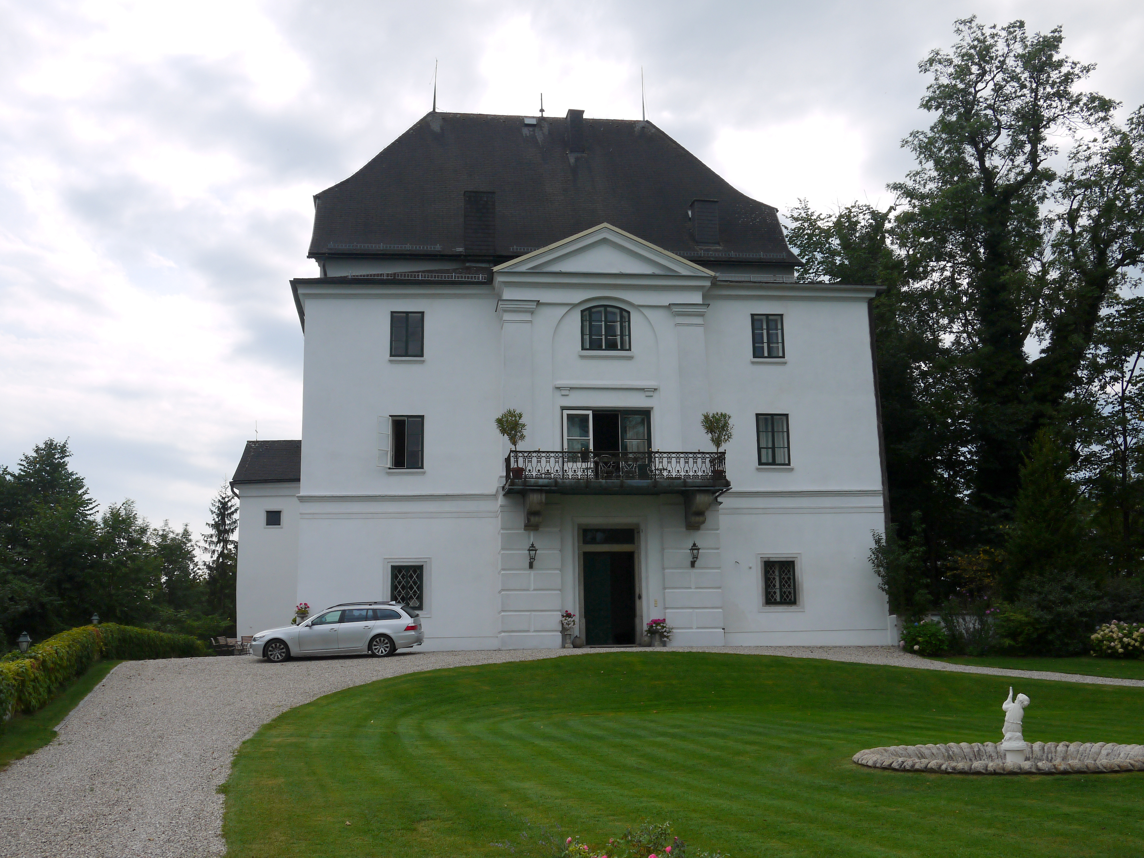 Schloss Wolfsegg mit Wirtschaftsgebäude